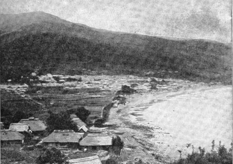 1900年前後の熱海